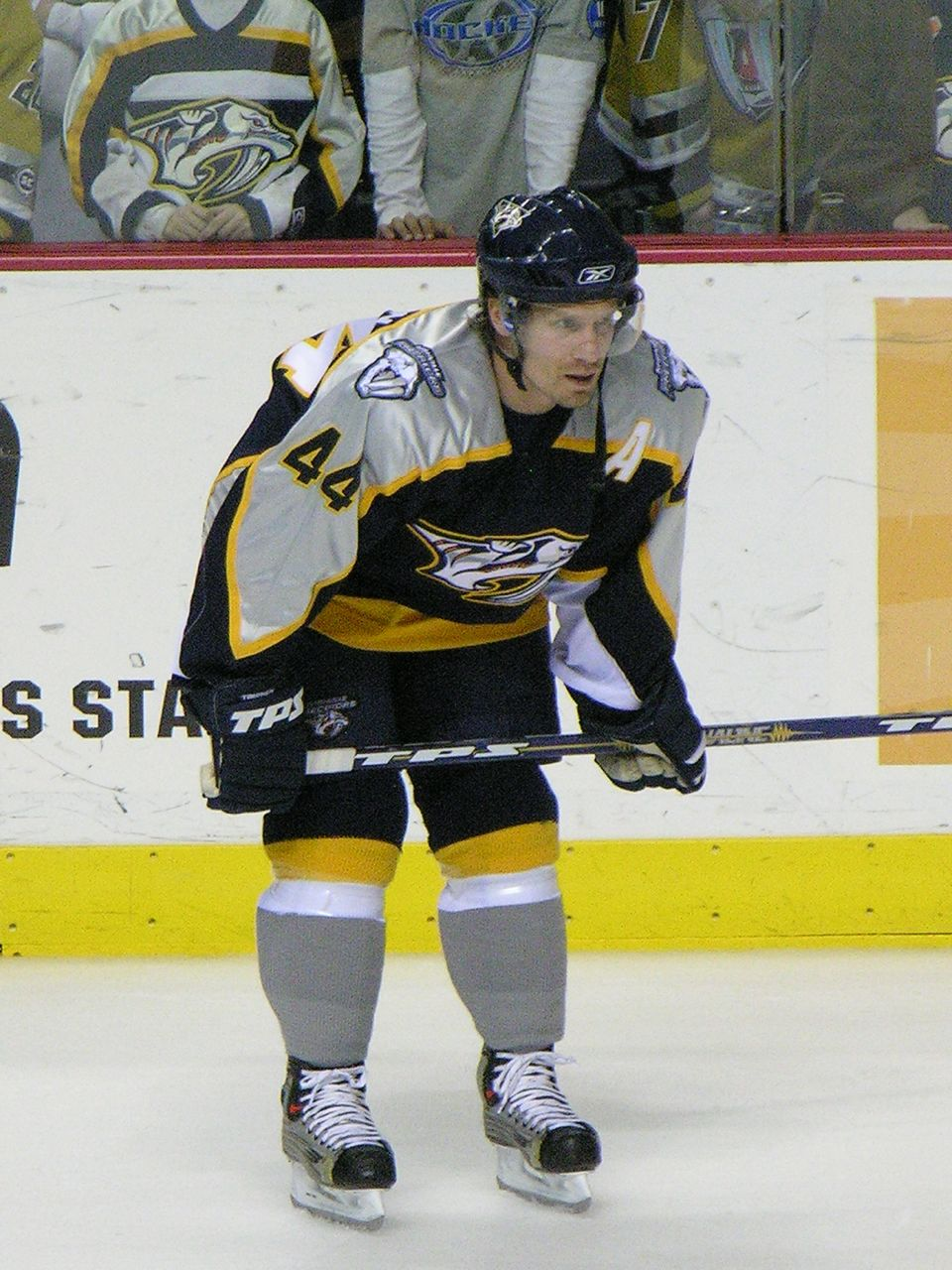 Kimmo Timonen